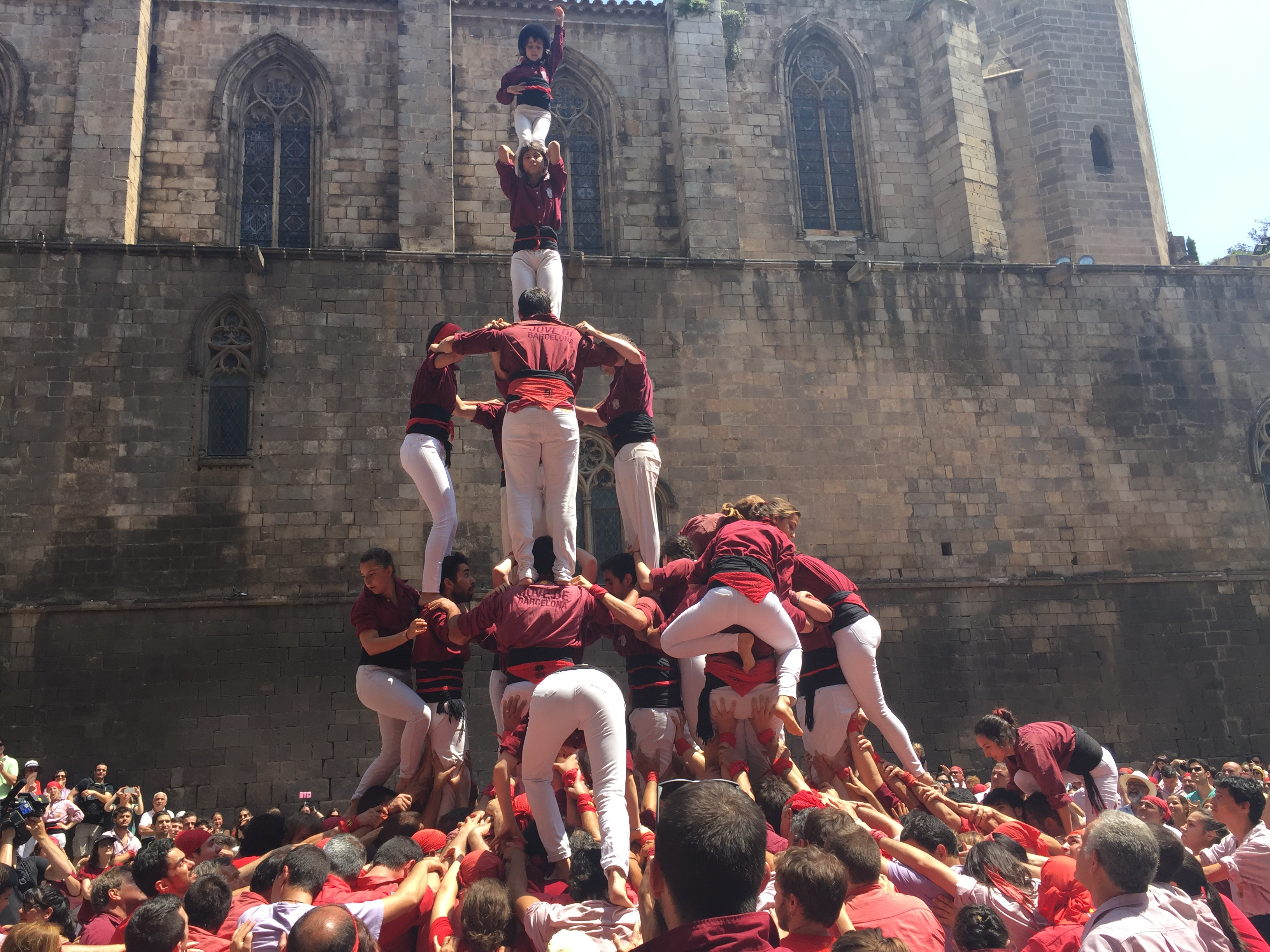 Segon 7d7p de la Jove de Barcelona. Diada d'Estiu a la plaça del Rei.